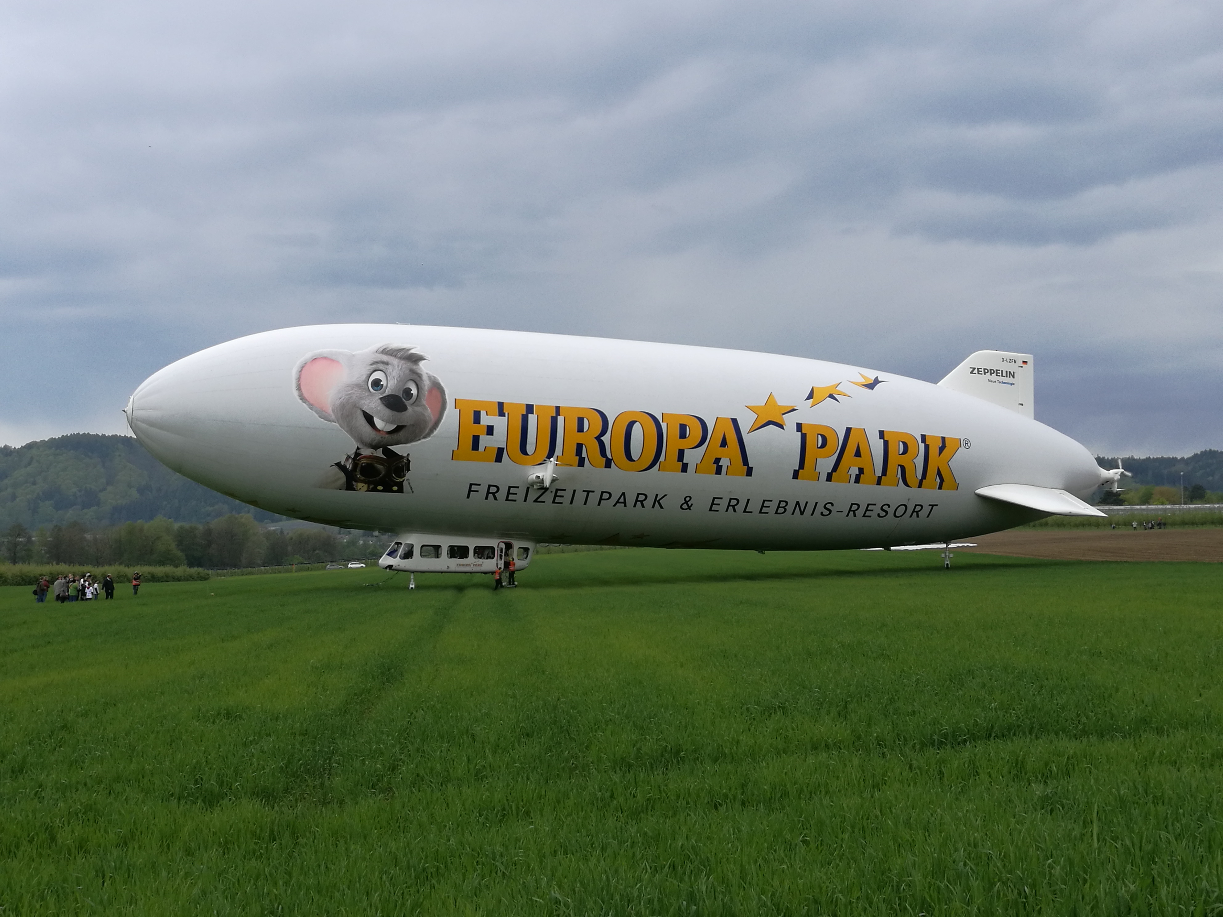 Deutschland (D) - Baden-Württemberg (BW) - Landkreis Konstanz (KN) - Stockach-Wahlwies: Zeppelin NT "zu Besuch" anlässlich des 70. Jahrestags des Pestalozzi Kinder- und Jugenddorfs